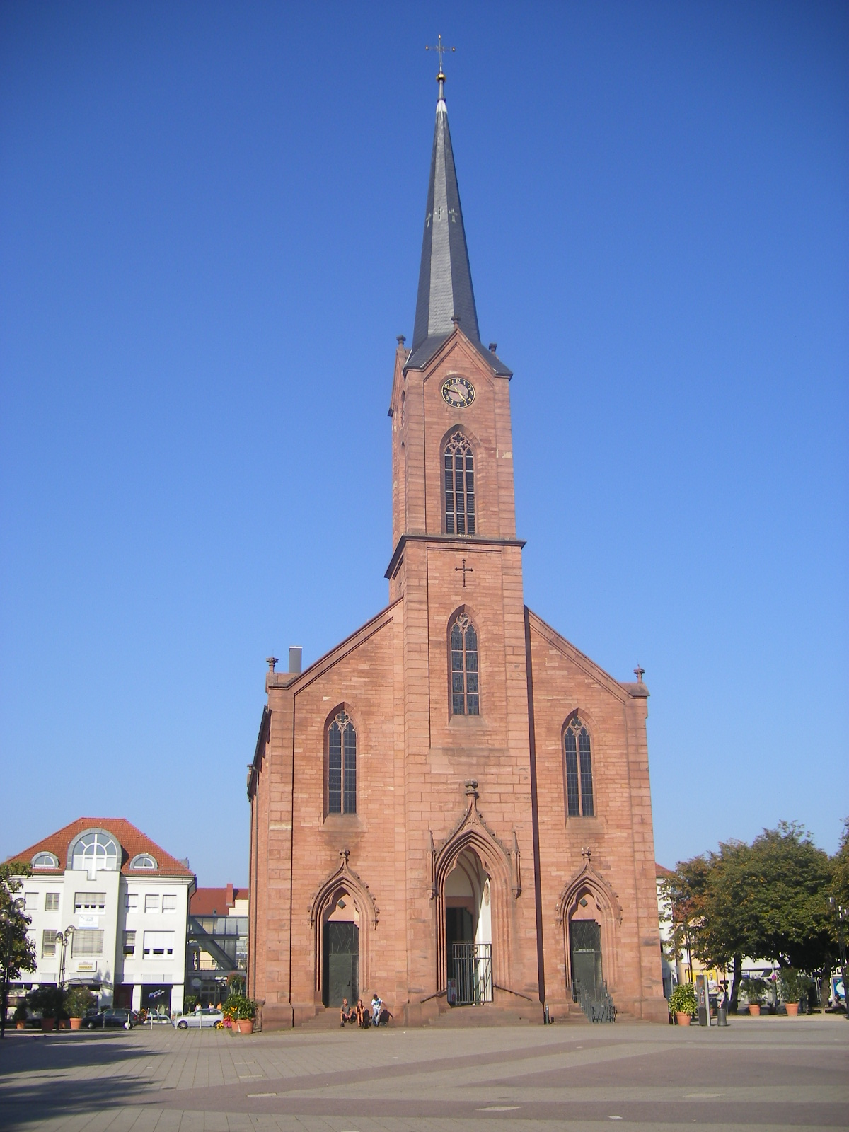 Kehl